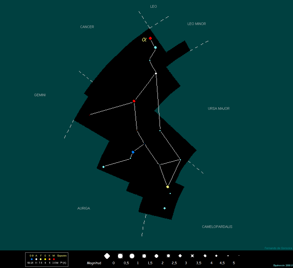 LYNX o el lince. Constelación del Hemisferio: NORTE.